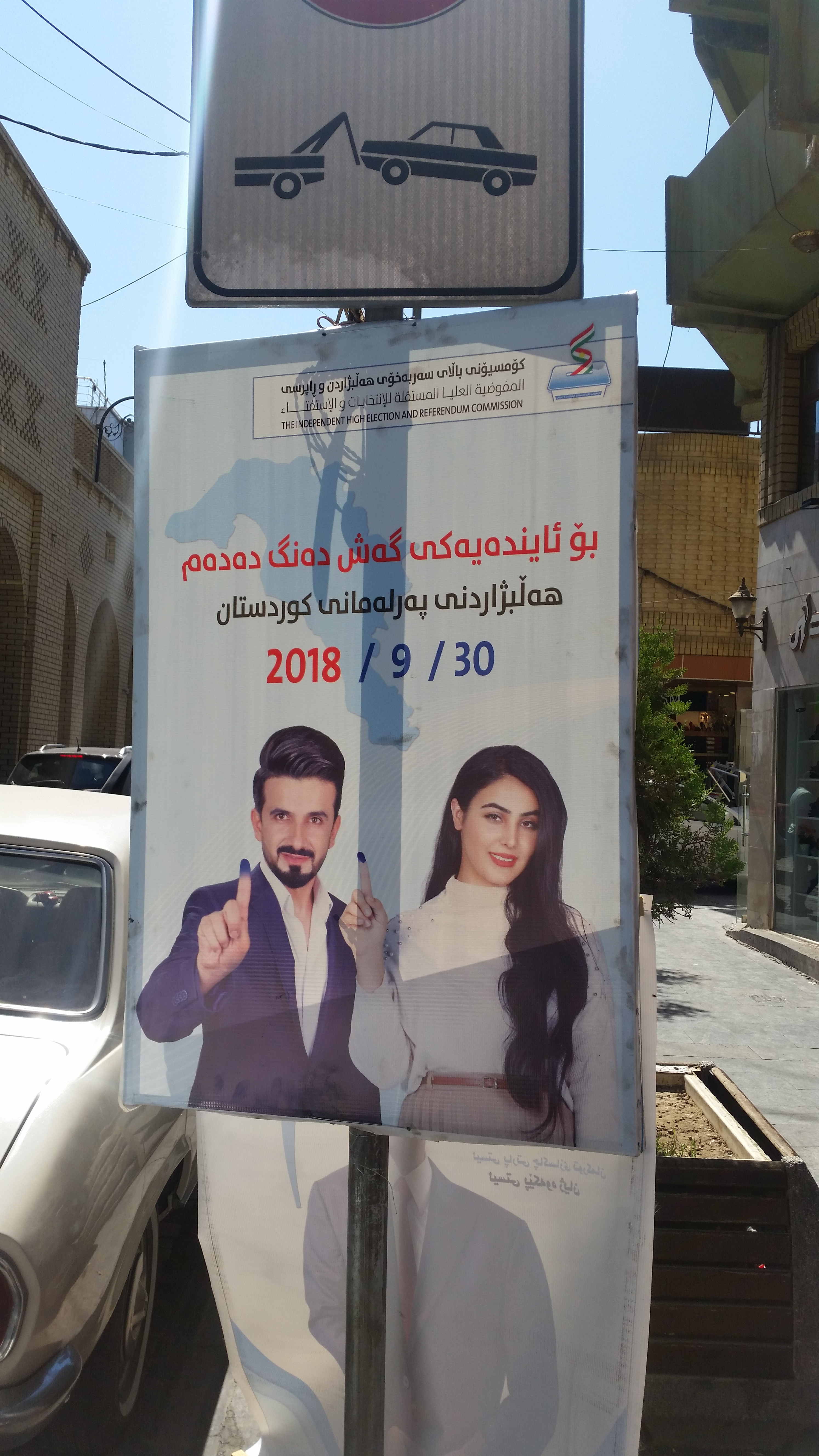 ملصق دعائي لمفوضية انتخابات اقليم كوردستان العراق